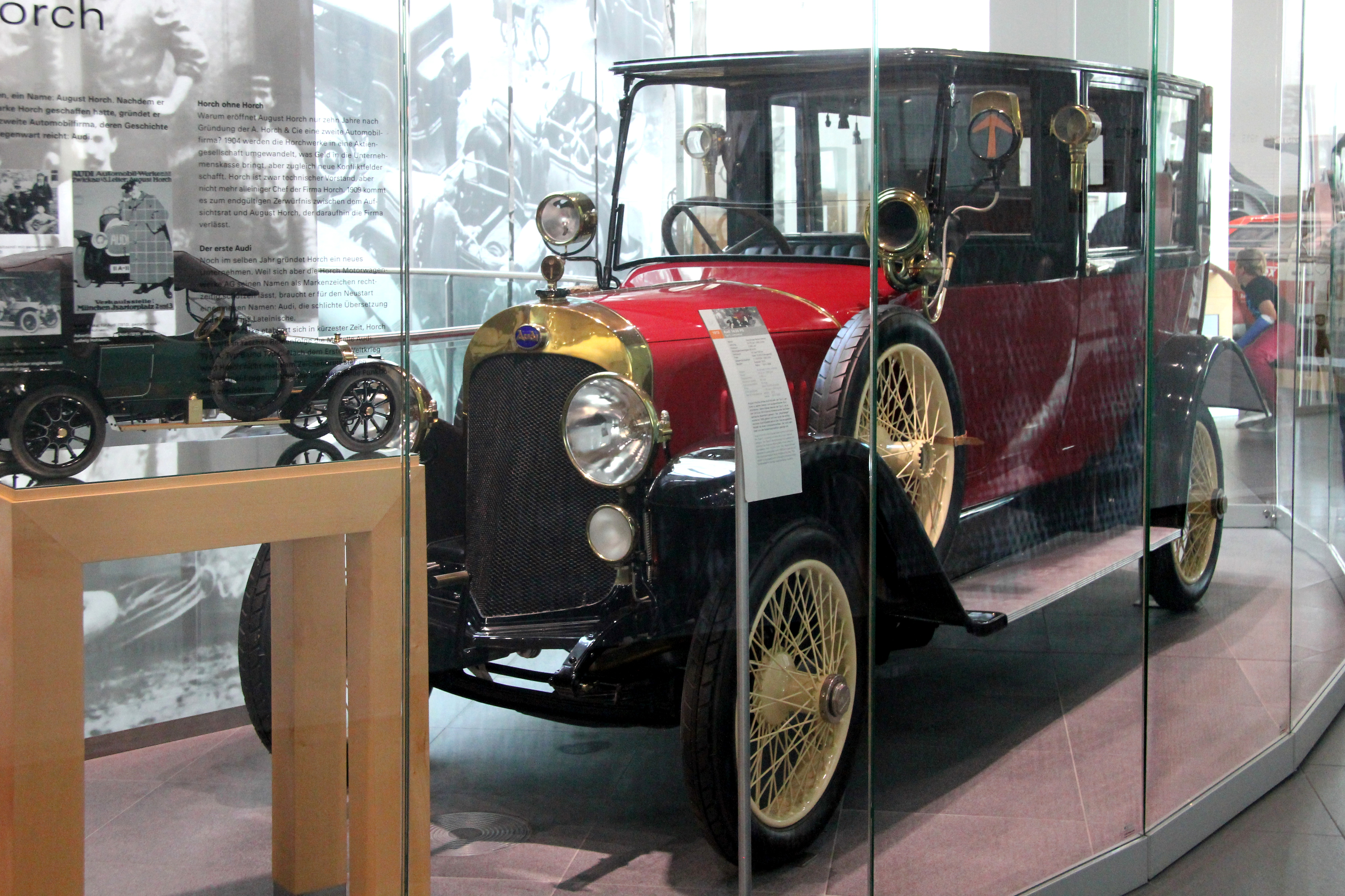 Audi Typ C, Baujahr 1913, im museum mobile in Ingolstadt